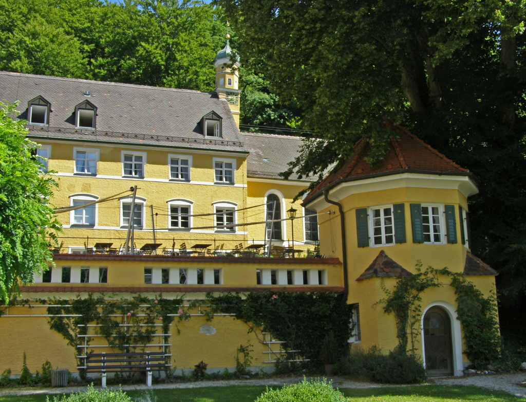 Heilbad Krumbad - Kapelle und Garten-Restaurant